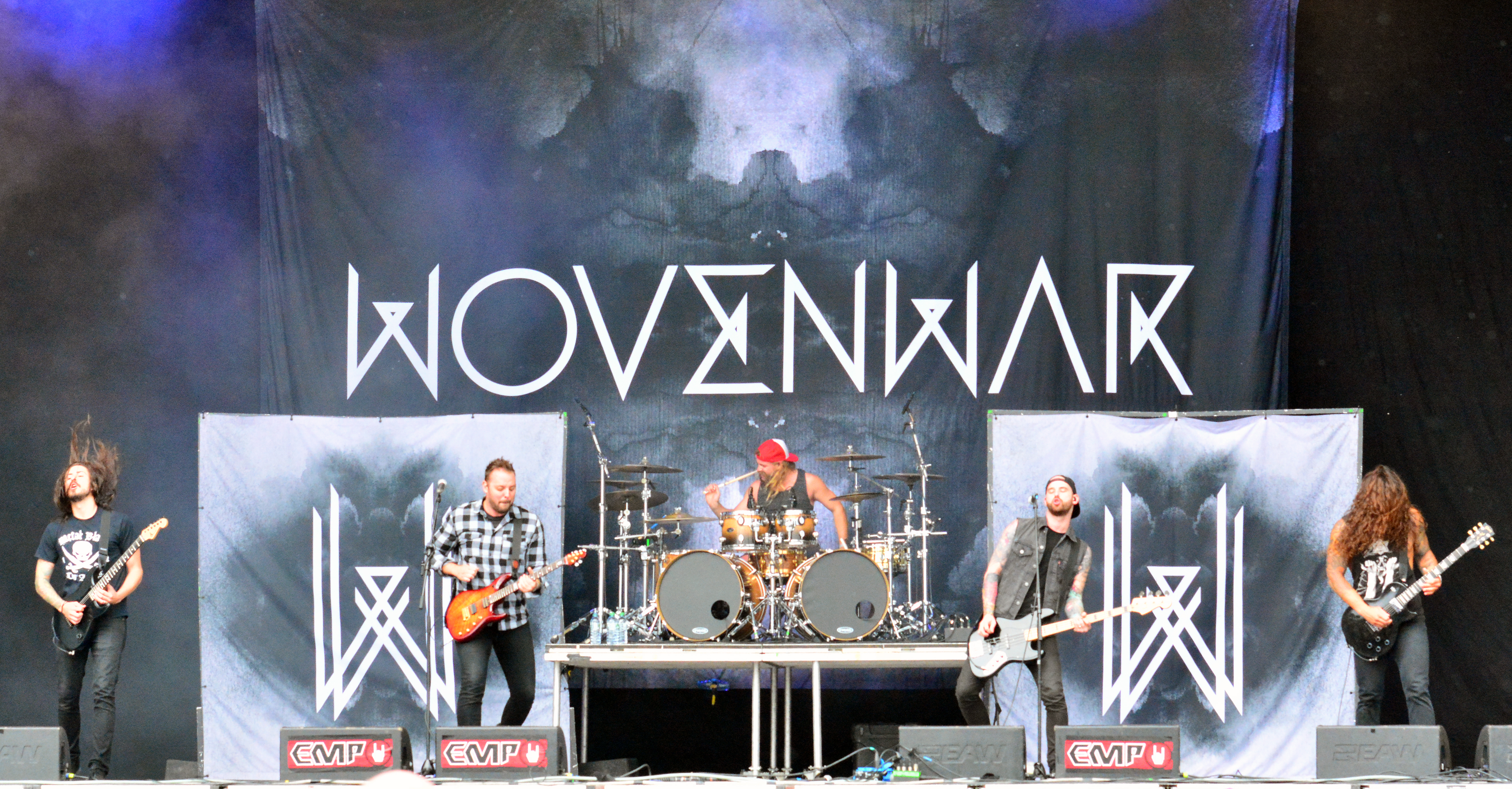 Wovenwar beim Elbriot 2014